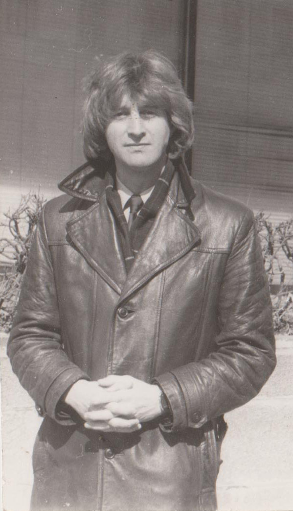 Леонид Ярмольник, БКЗ Октябрьский, 1985